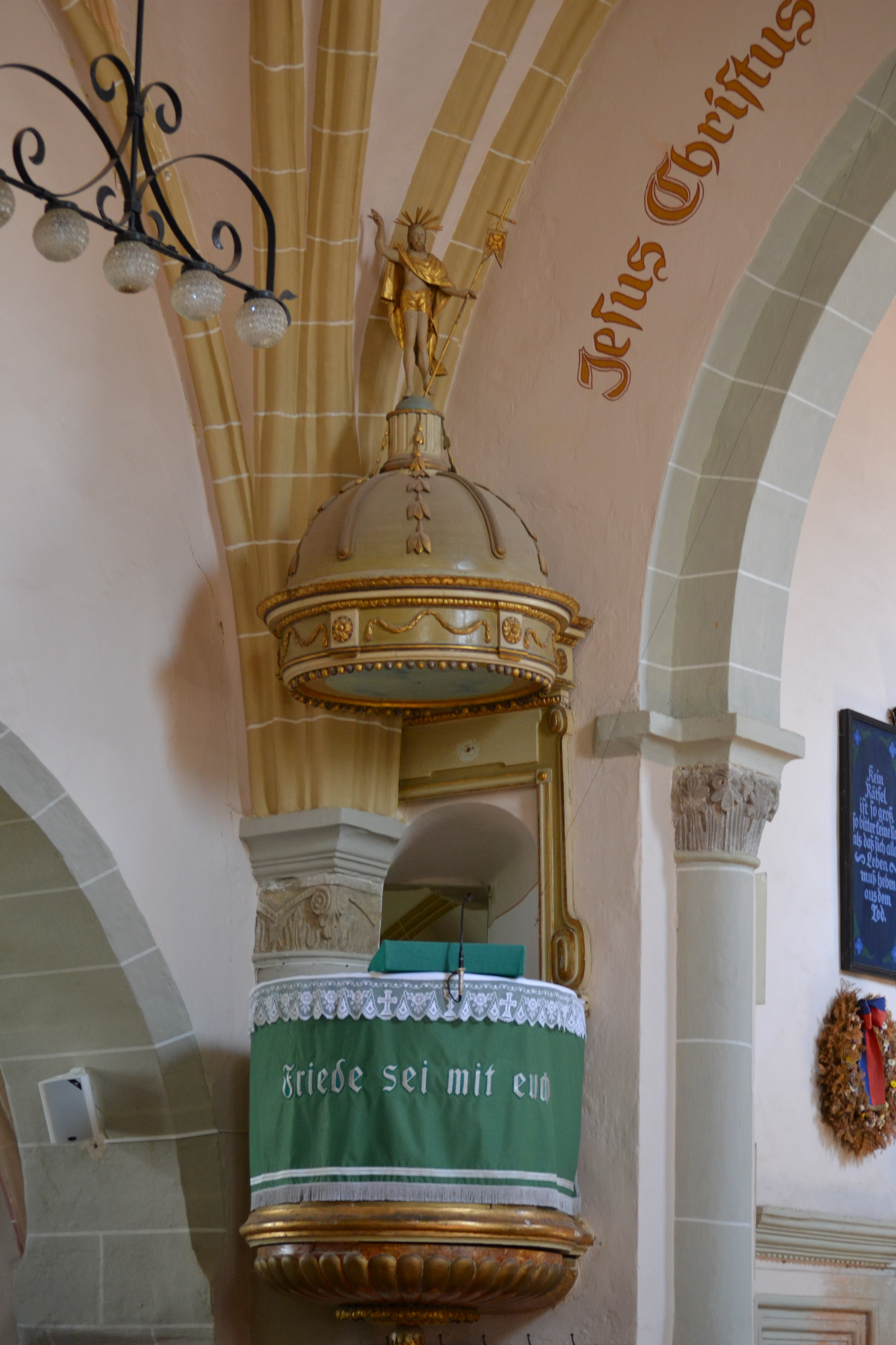 Biserica evanghelică 01